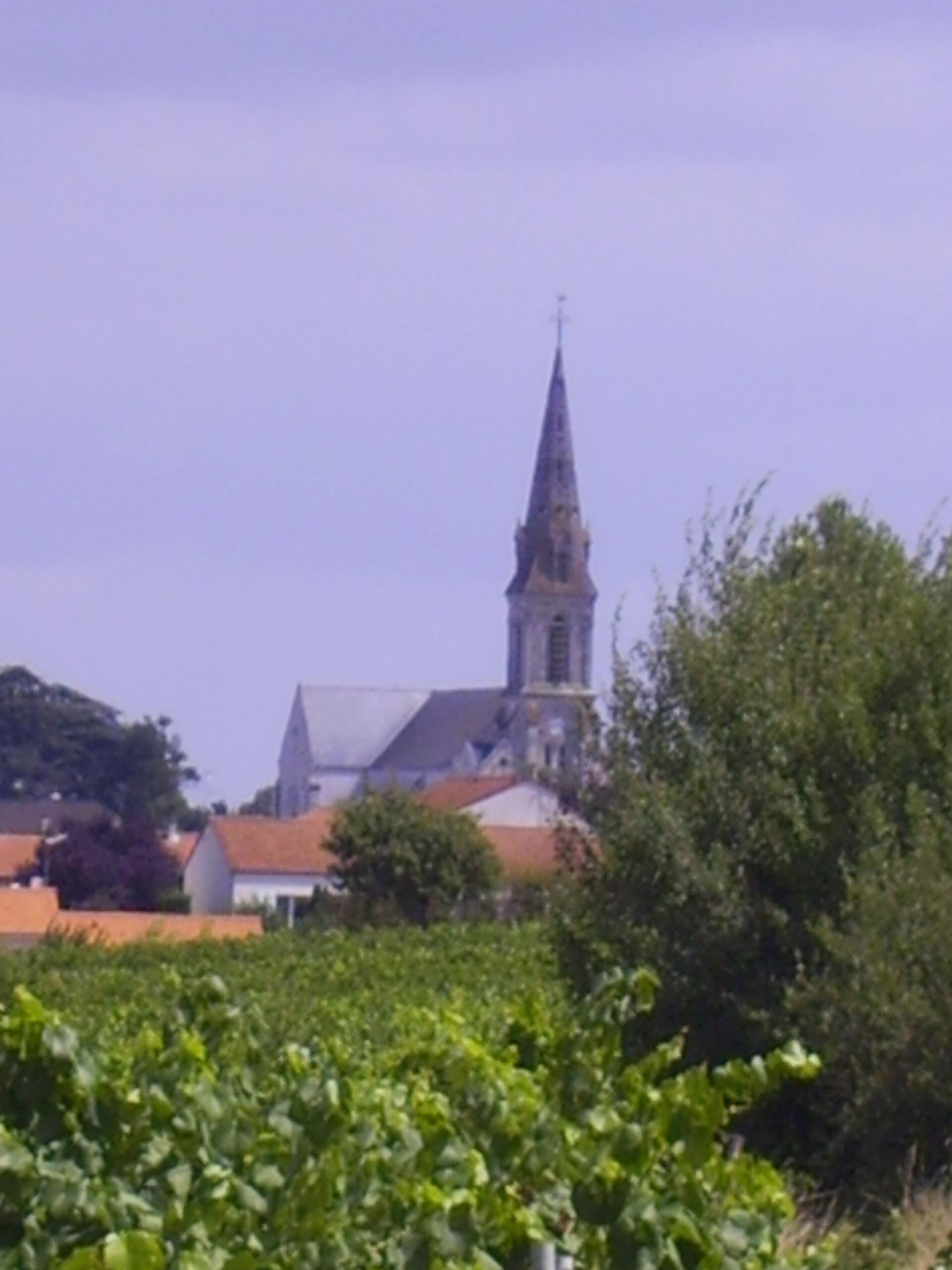 Bouzillé